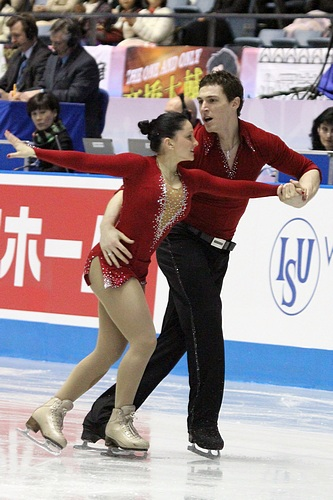 Дарья Попова и Бруно Массо (Франция) на командном чемпионате мира по фигурному катанию 2012